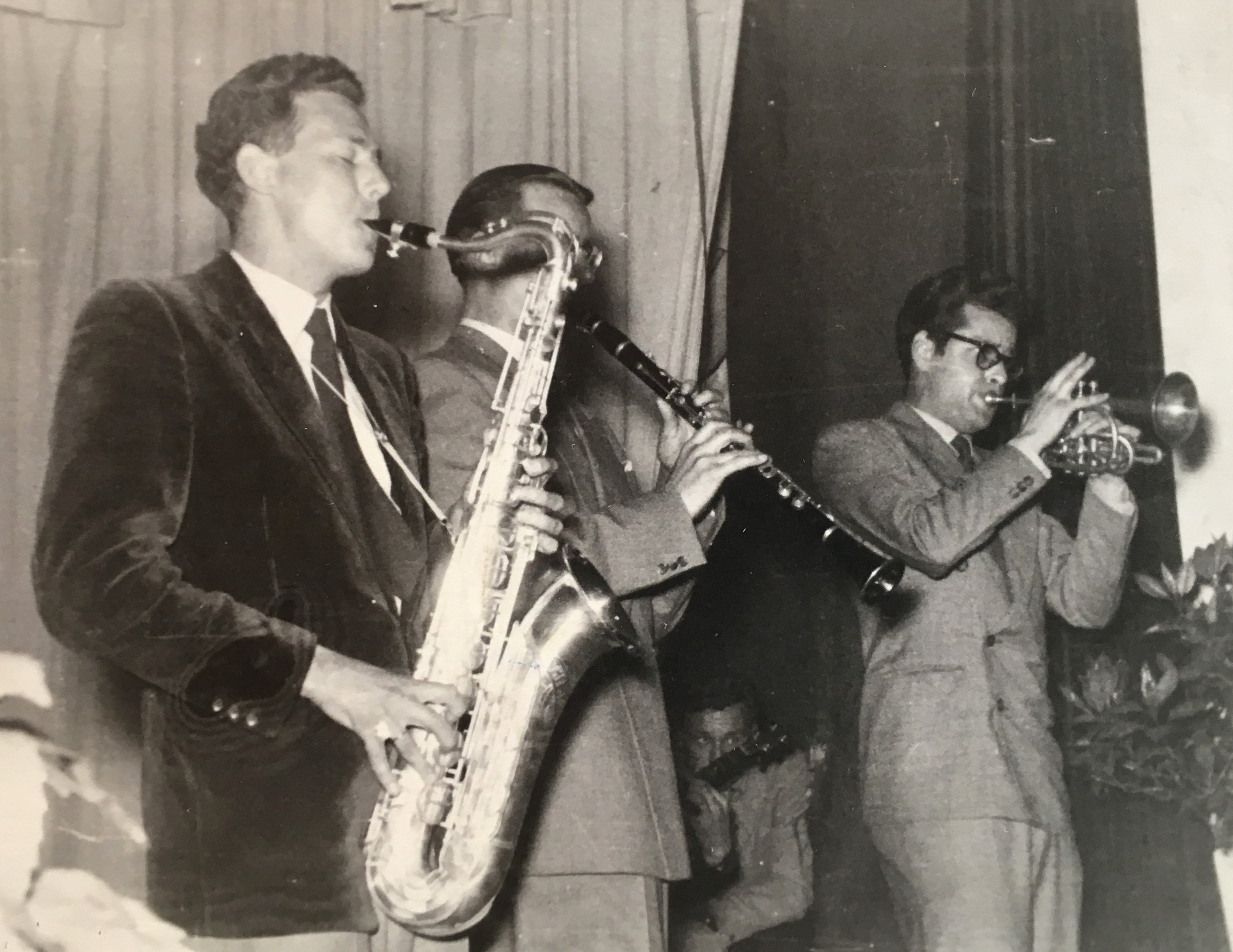 Walter Fröhlich (ts), Werner Greiner (cl) und Jan Dix (co) vermutlich Anfang der 1950er-Jahre